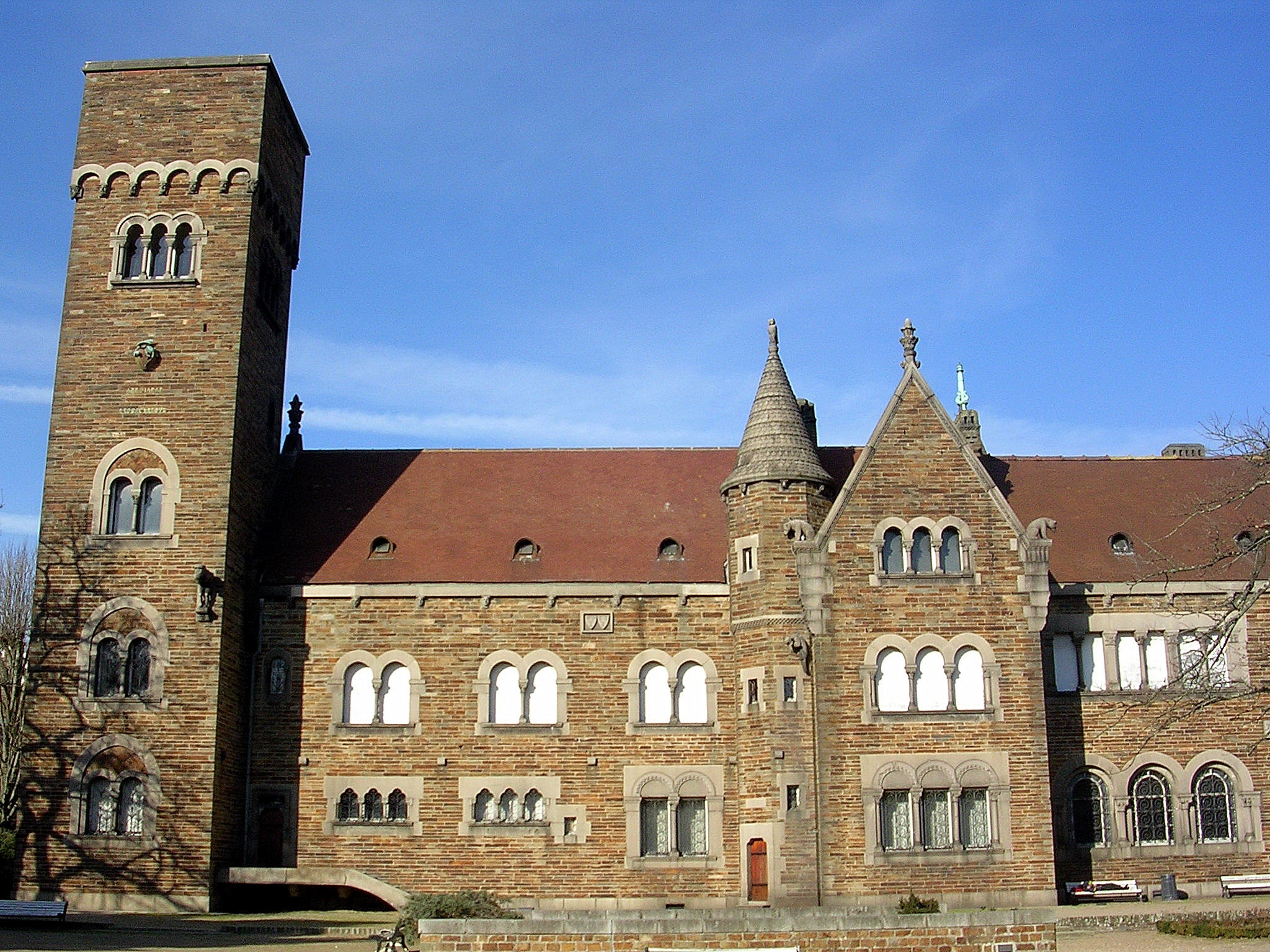 Nantes, palais Dobrée. Photo prise par Jibi44